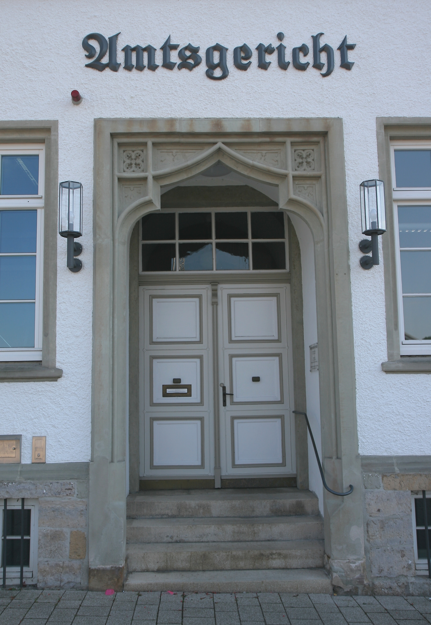 Amtsgericht Medebach, Marktstraße 2 in Medebach. This image shows a heritage building in Germany, located in the North Rhine-Westphalian city Medebach (no. 3).